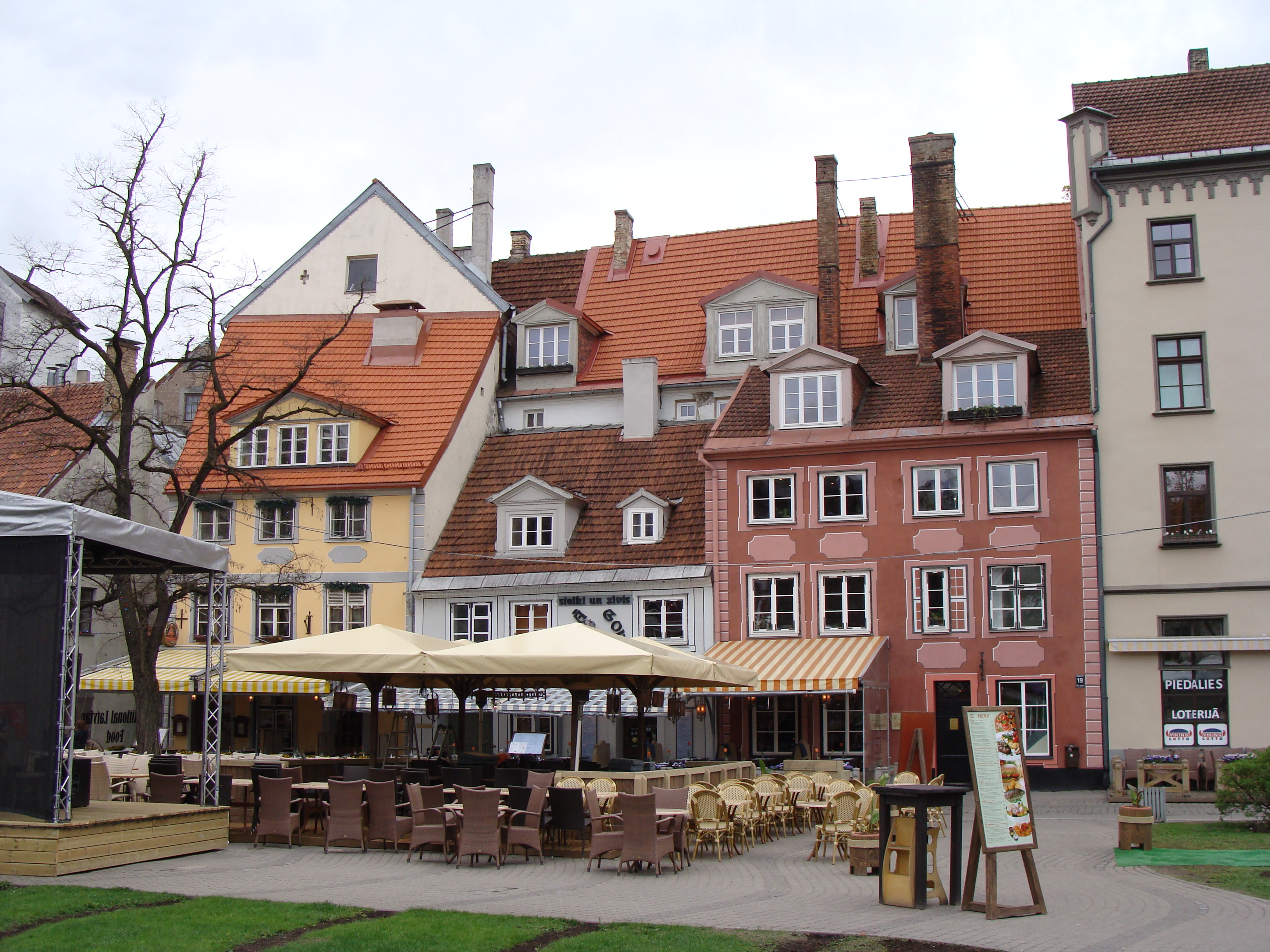 Līvu laukums